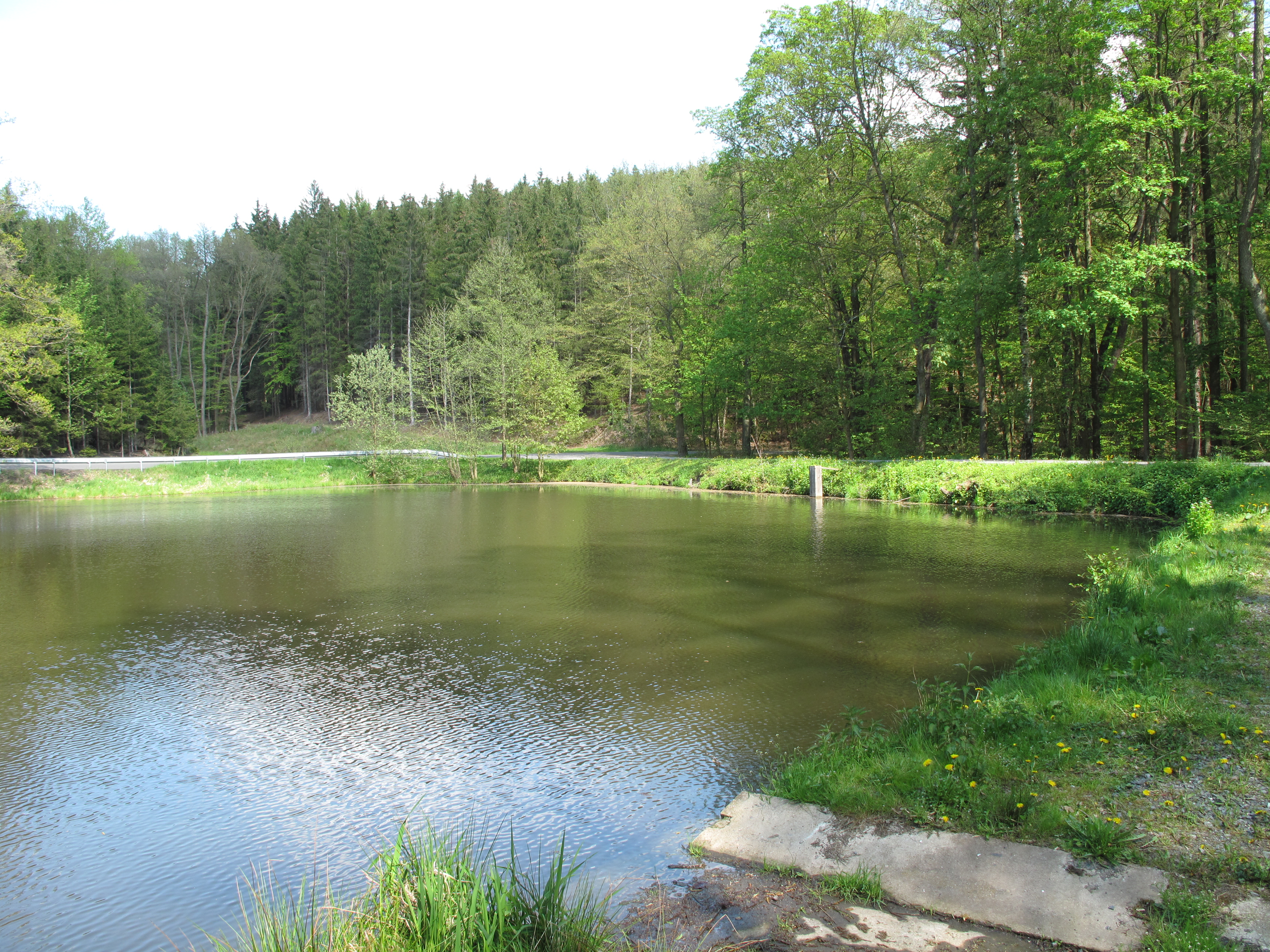 Pilský rybník na Jevanském potoce. Okres Praha-východ, Česká republika.